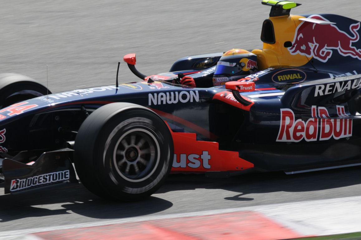 Sébastien Buemi im Qualifying zum GP2 Rennen in Spanien, 2008